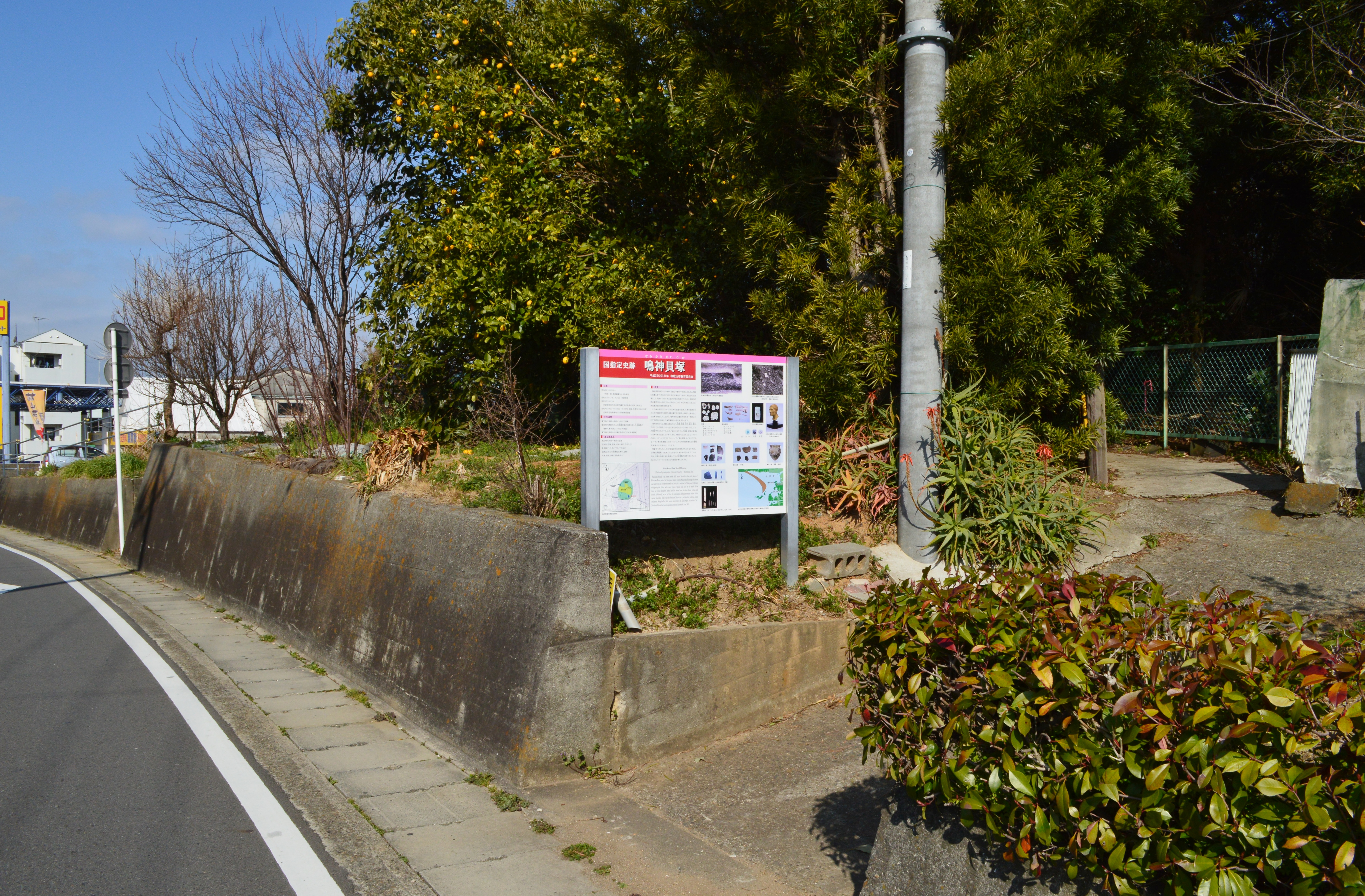 鳴神貝塚 説明板